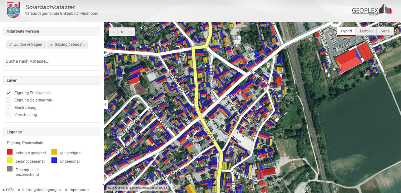 Solardachkataster Enklenbach-Alsenborn